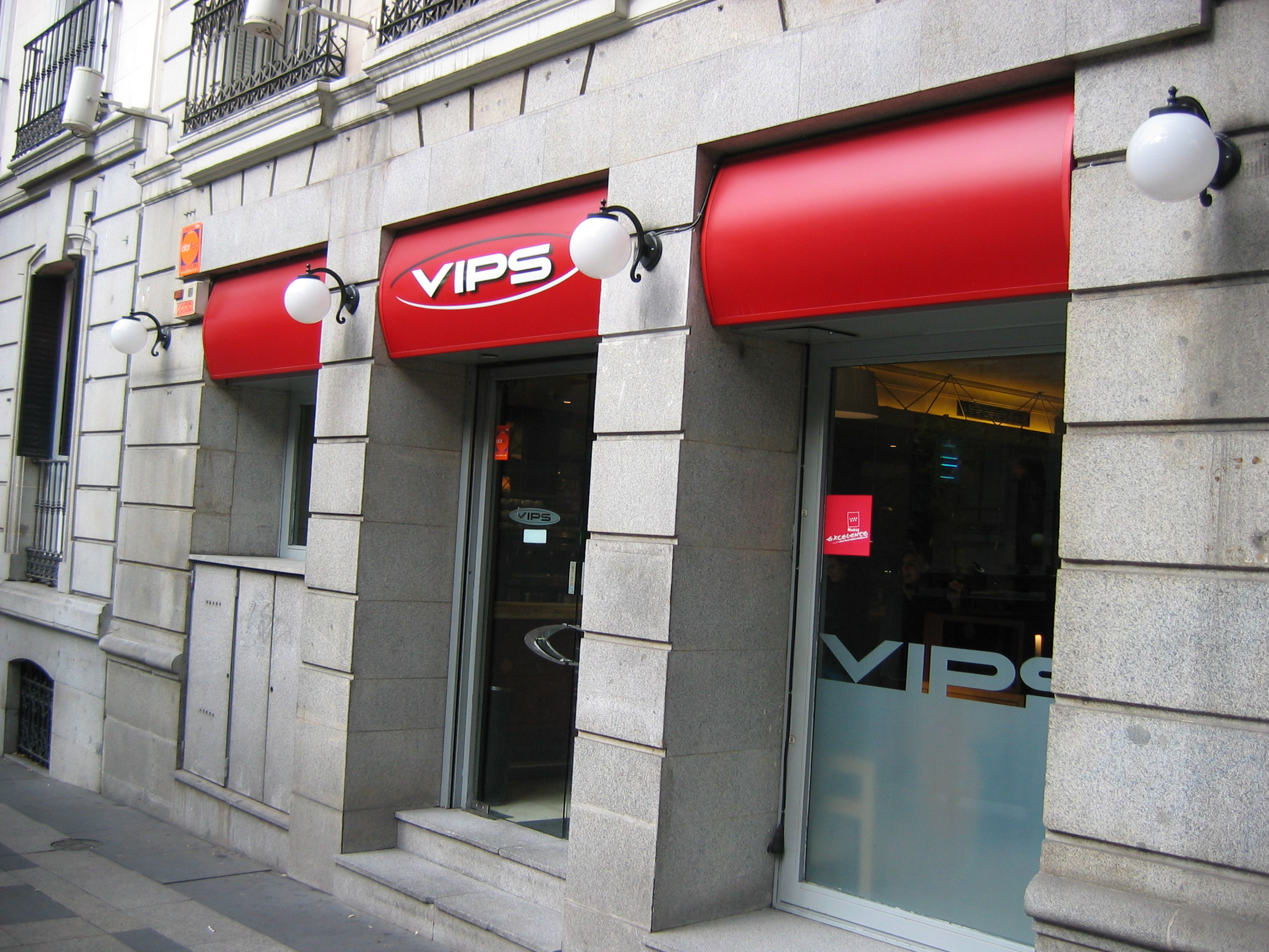 Manifestación 12-N 2005-11-12--13.02.58